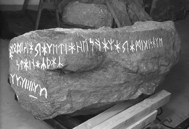 Förslag till komplettering av Söderköpingsstenen. Ifylld av Professor Ivar Lindqvist.